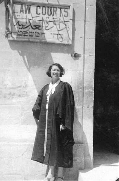 he:רוזה גינוסר